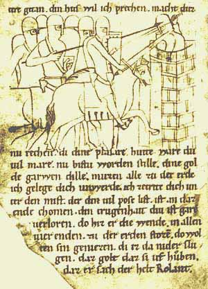 Roland stürmt den Tempel Mahomets. Rolandslied des Pfaffen Konrad. Übersetzung bzw. Bearbeitung der altfranzösischen Chanson de Roland (um 1100). Blatt 57v